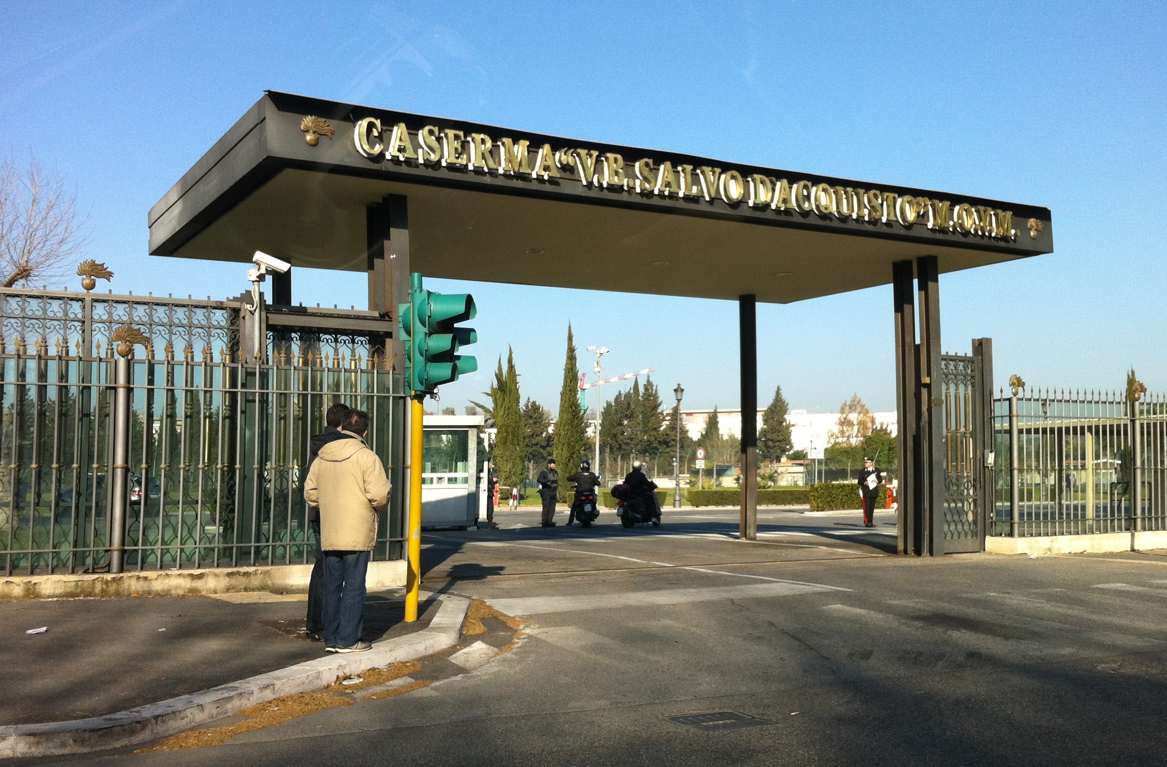 Entrata della caserma Salvo D'Acquisto dell'Arma dei Carabinieri, sita in viale di Tor di Quinto a Roma. Sede del Centro Nazionale Selezione e Reclutamento dell'Arma, del Comando delle unità mobili e specializzate carabinieri "Palidoro", dei RIS di Roma ecc.